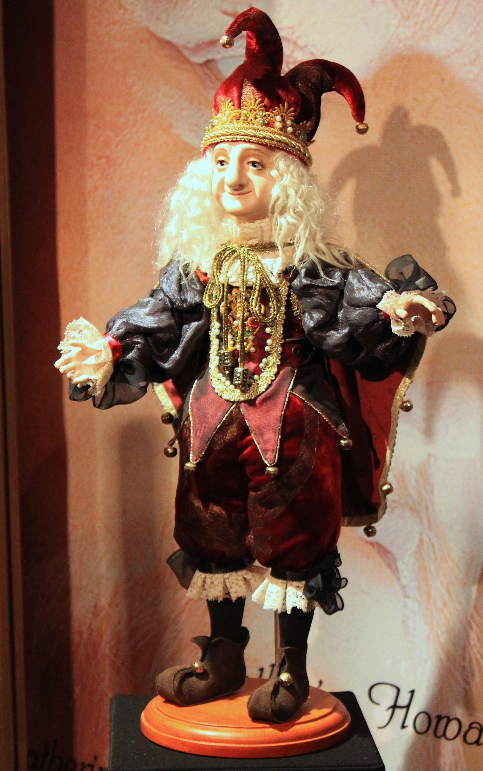 Jester-doll made by Olina Ventsel (1938-2007)